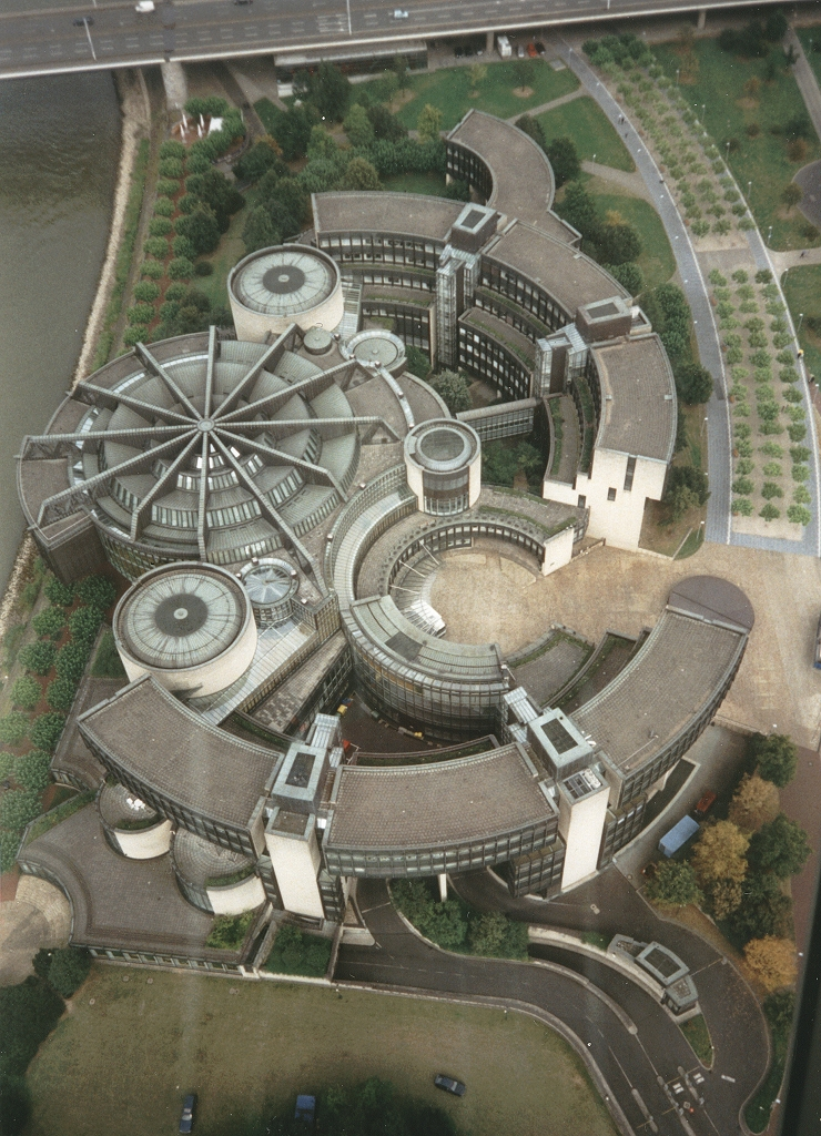 Düsseldorf: Landtag Nordrhein-Westfalens, fotografiert vom Rheinturm Lizenz: GNU FDL Fotograf: Daniel Beyer ✉